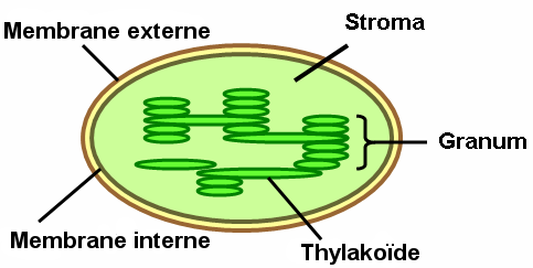 Thylakoide dans un chloroplaste